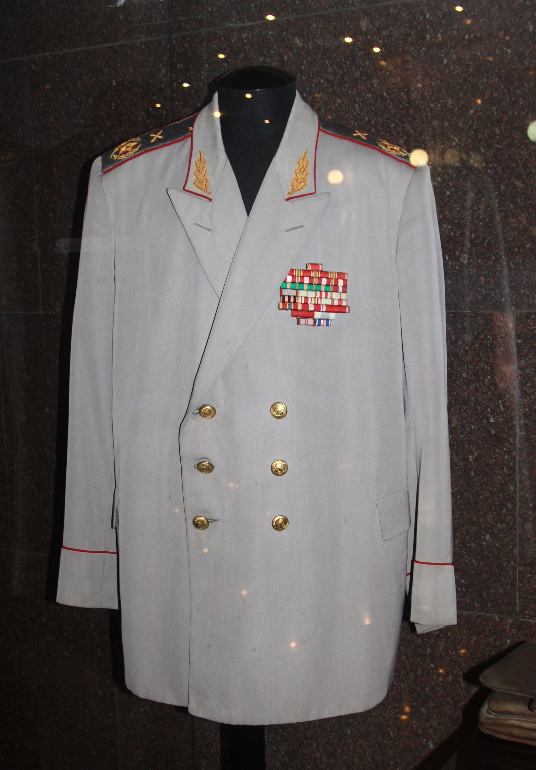 Личный повседневный китель образца 1954 года Главного маршала артиллерии Николая Николаевича Воронова